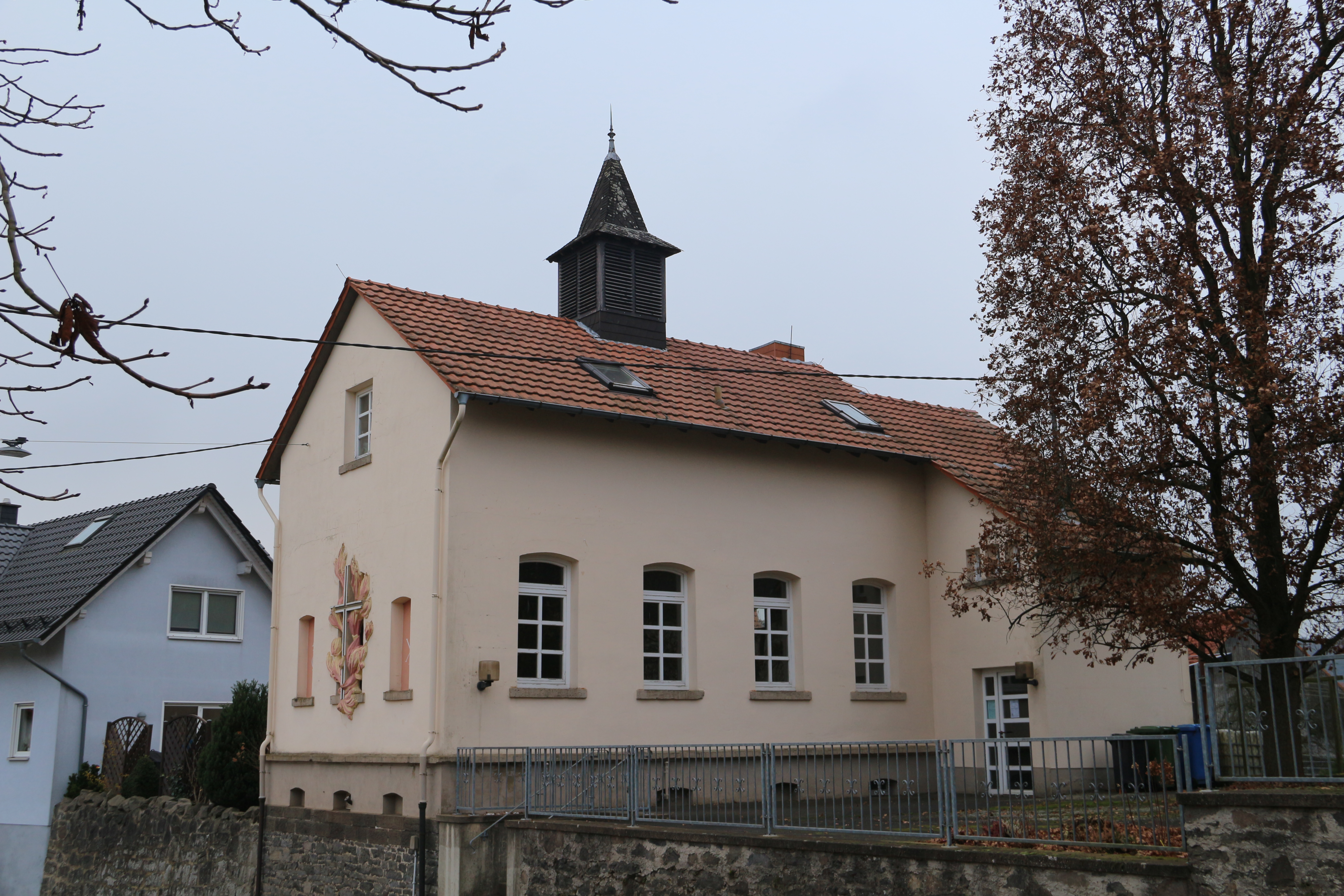 Kirche